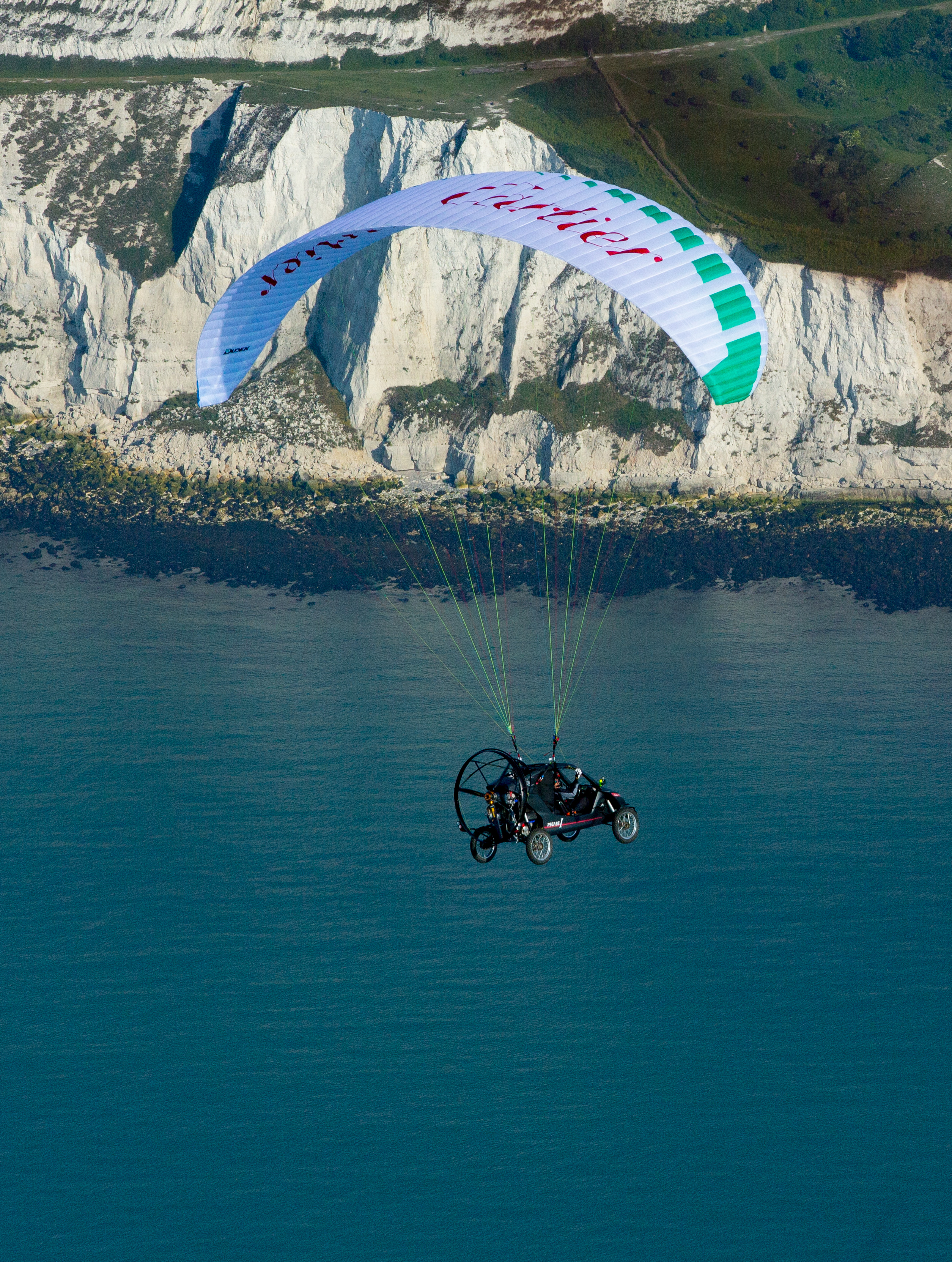 Le survol des falaises anglaises avec Pégase lors de la 1ère traversée de la Manche en voiture volante.